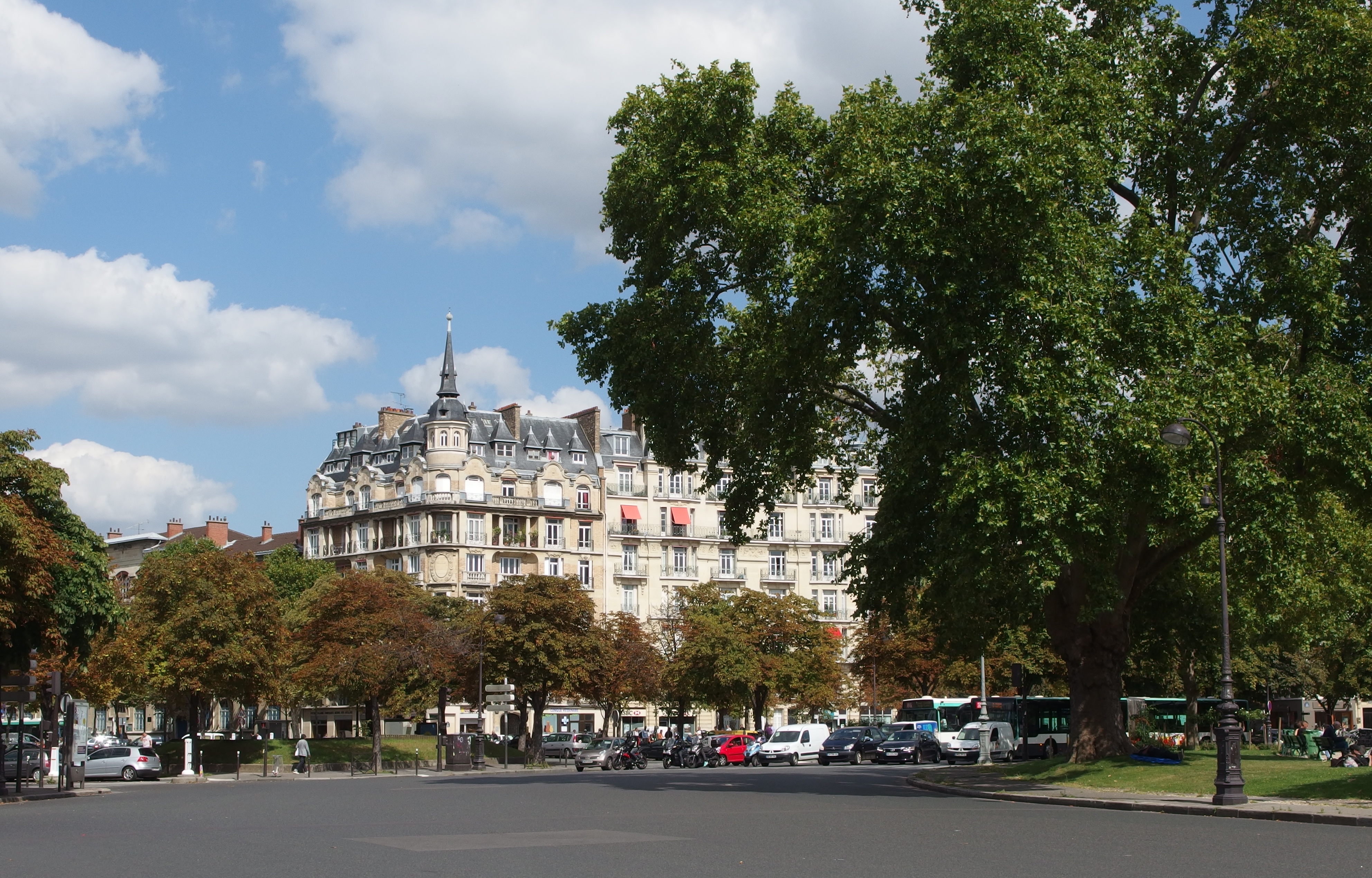 Place de la Nation, Paris.